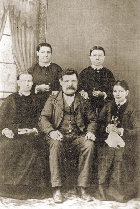 La foto muestra a los hermanos Ambord